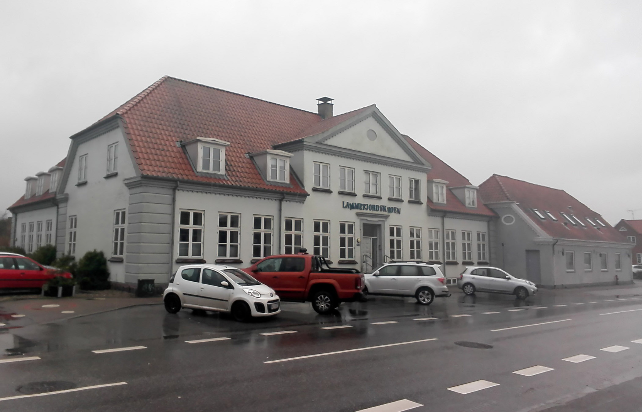 Lammefjordskroen i Hørve